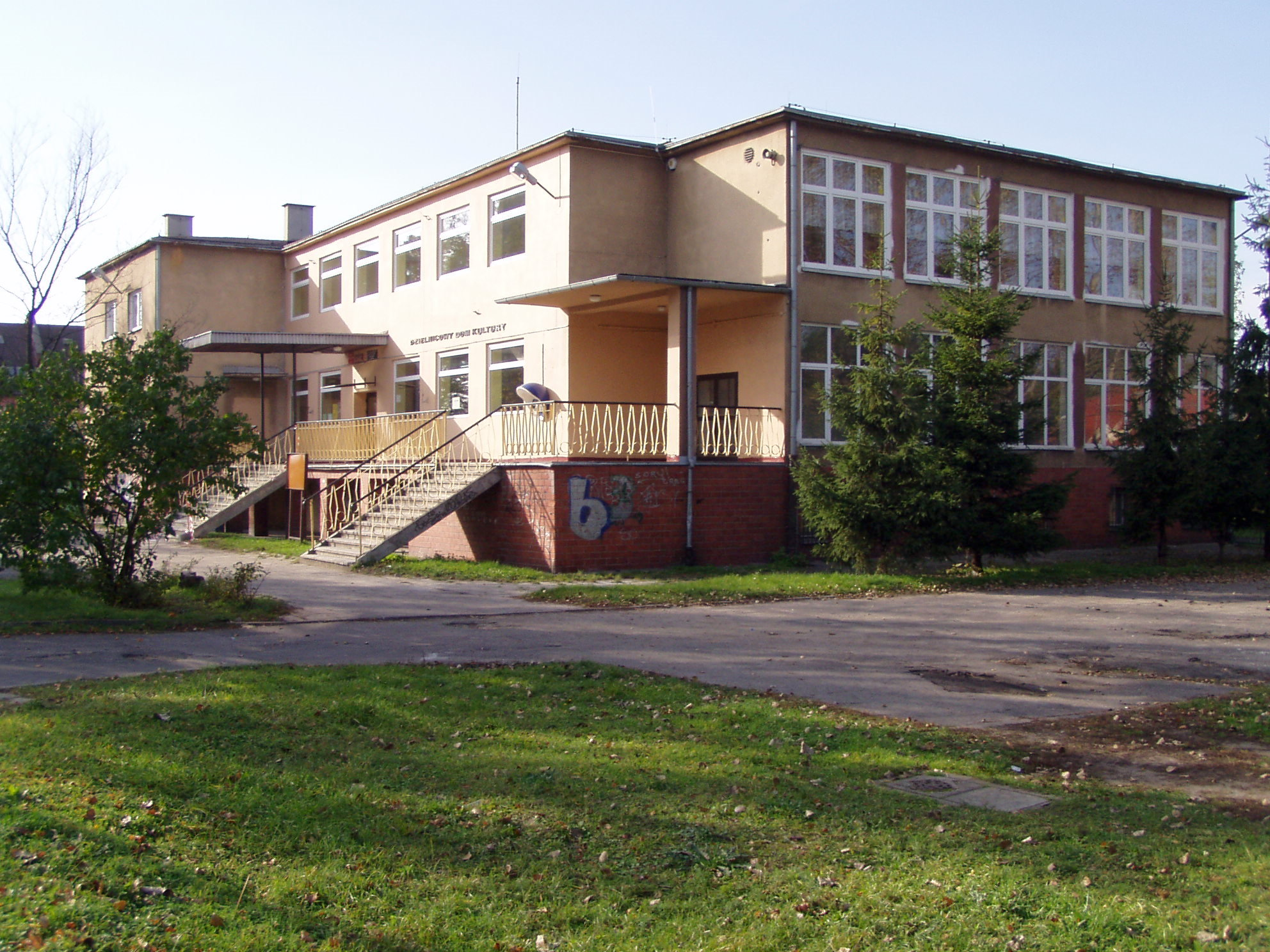 Dzielnicowy Dom Kultury, Rudak-Toruń